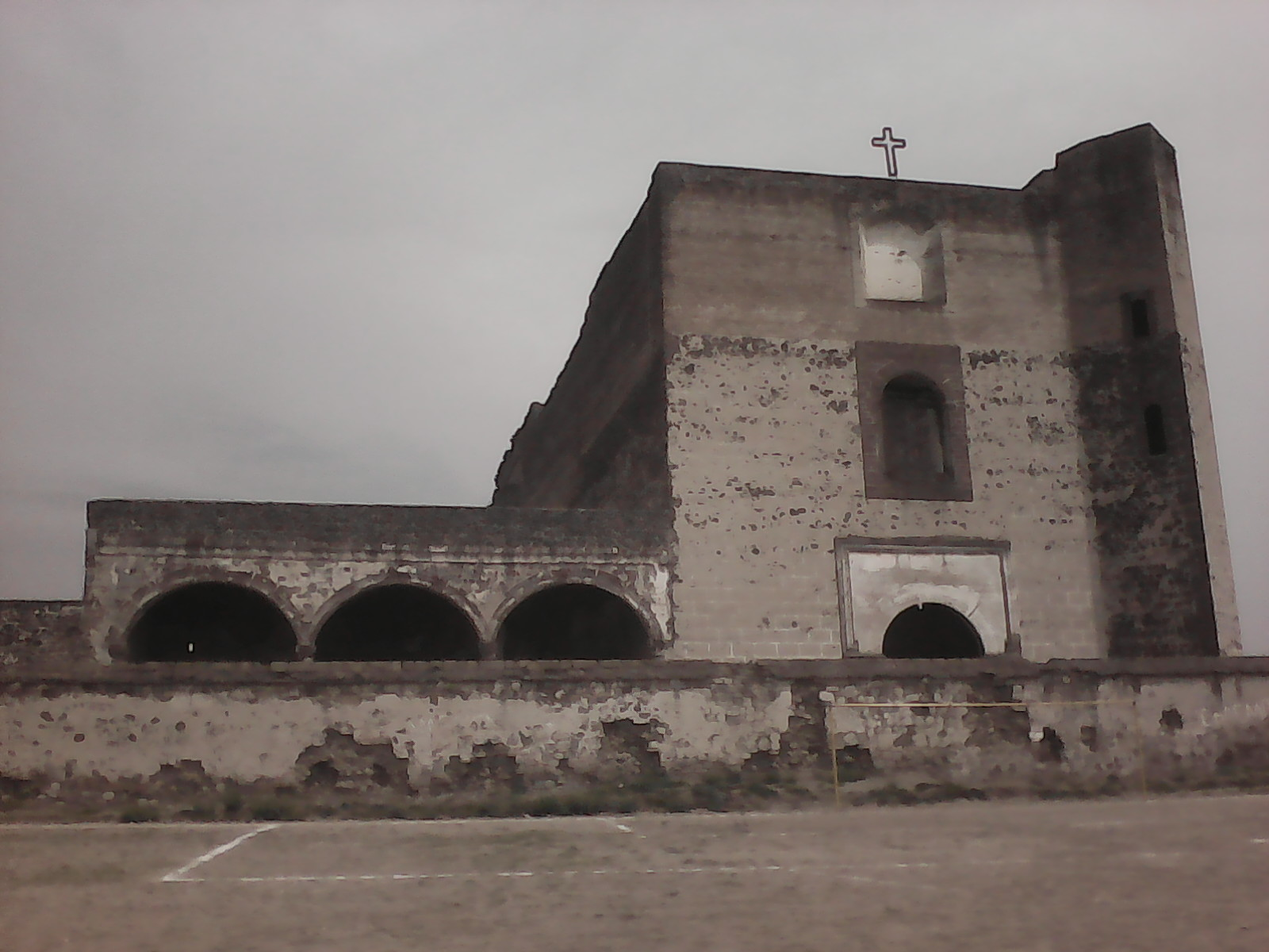 Exconvento de Santa María Atlihuetzia, Tlaxcala